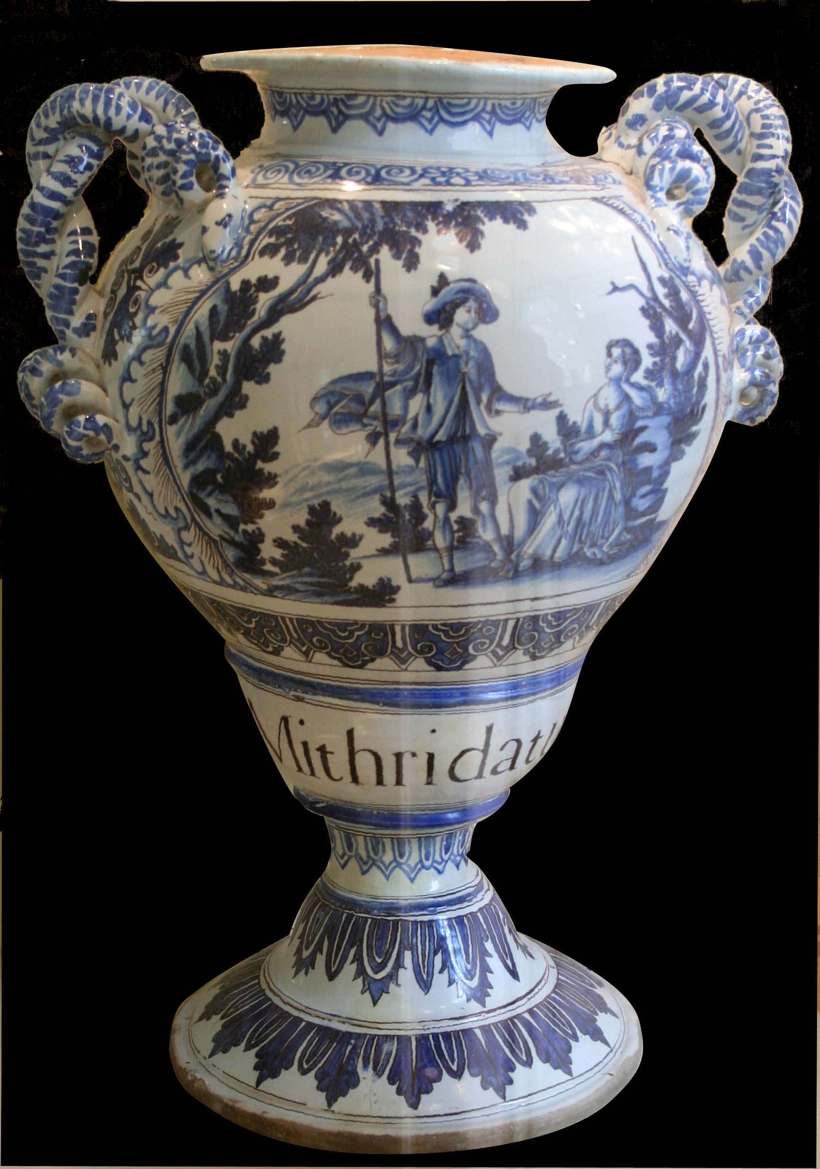 Vase de pharmacie par Clérissy de Saint Jean du désert au Musée des Arts décoratifs, de la Faïence et de la Mode au château Borély à Marseille. Faïence décor de grand feu en bleu (1685-1695)